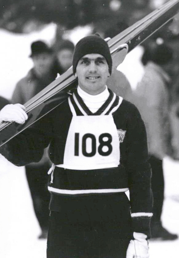 1963 Press Photo Gene Kotlarek After Norge Ski Jump - RRQ30113